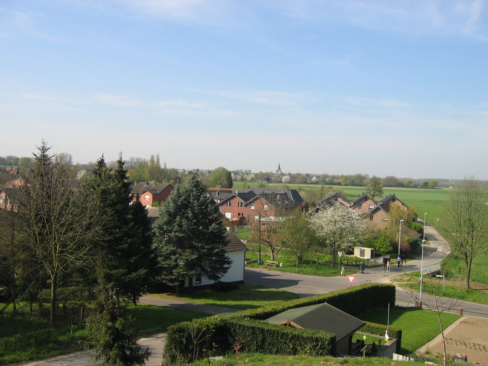 Leiffarth im Übergang zu Honsdorf und Würm im Hintergrund (Geilenkirchen, Deutschland)